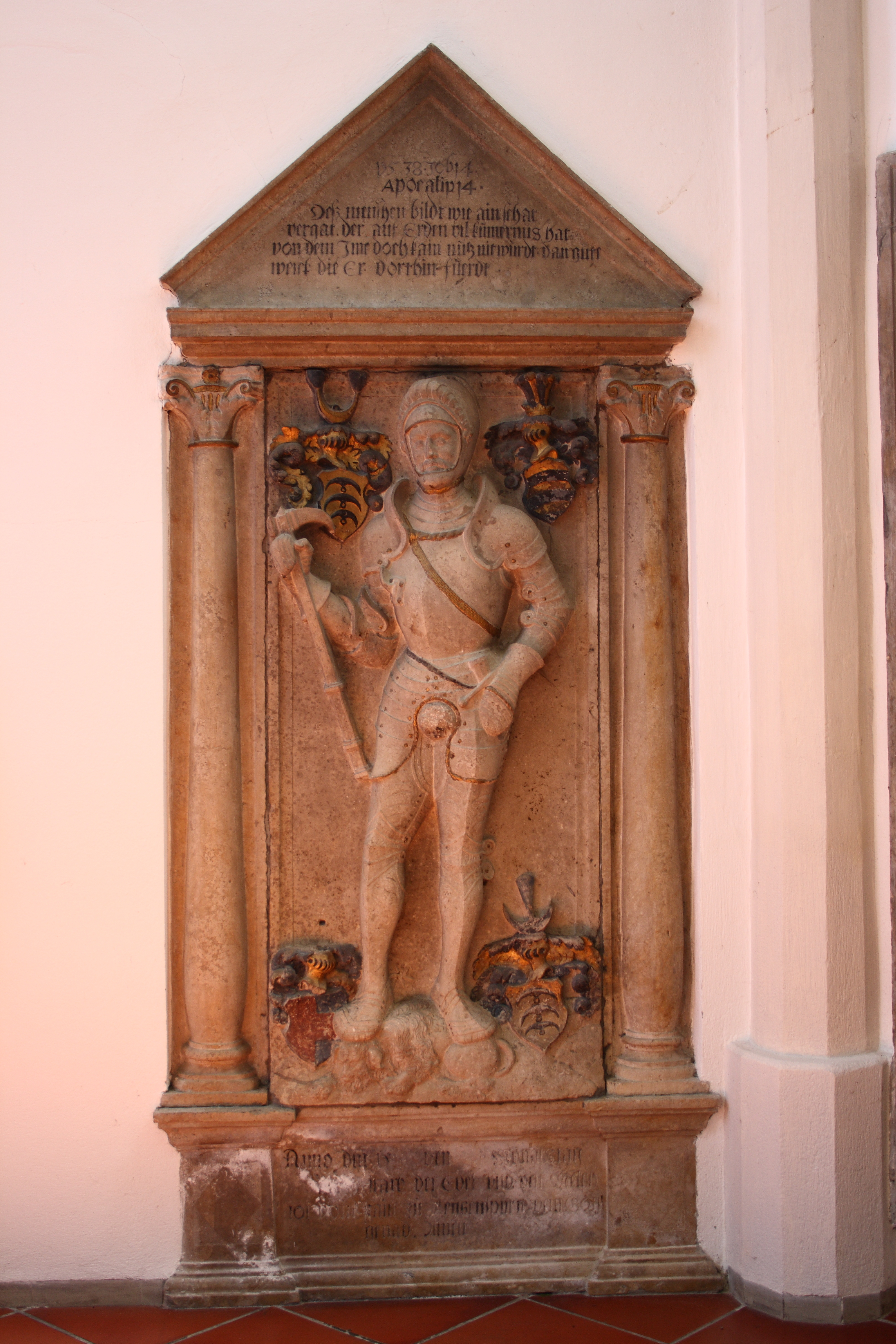 Katholische Pfarrkirche St. Martin in Jettingen, einem Ortsteil von Jettingen-Scheppach im Landkreis Günzburg (Bayern)